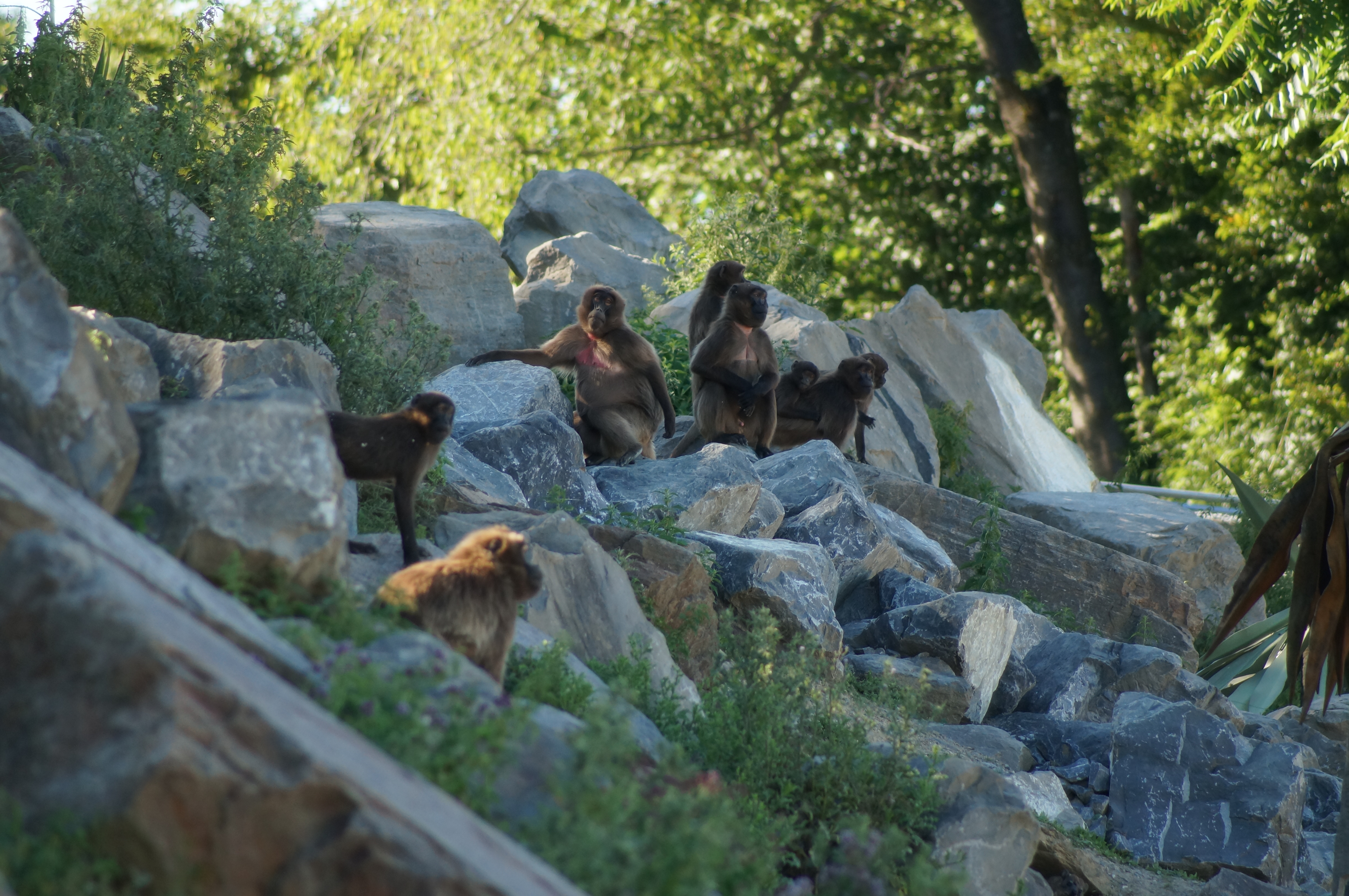 Dschelada im Zoo Zürich. Theropithecus gelada